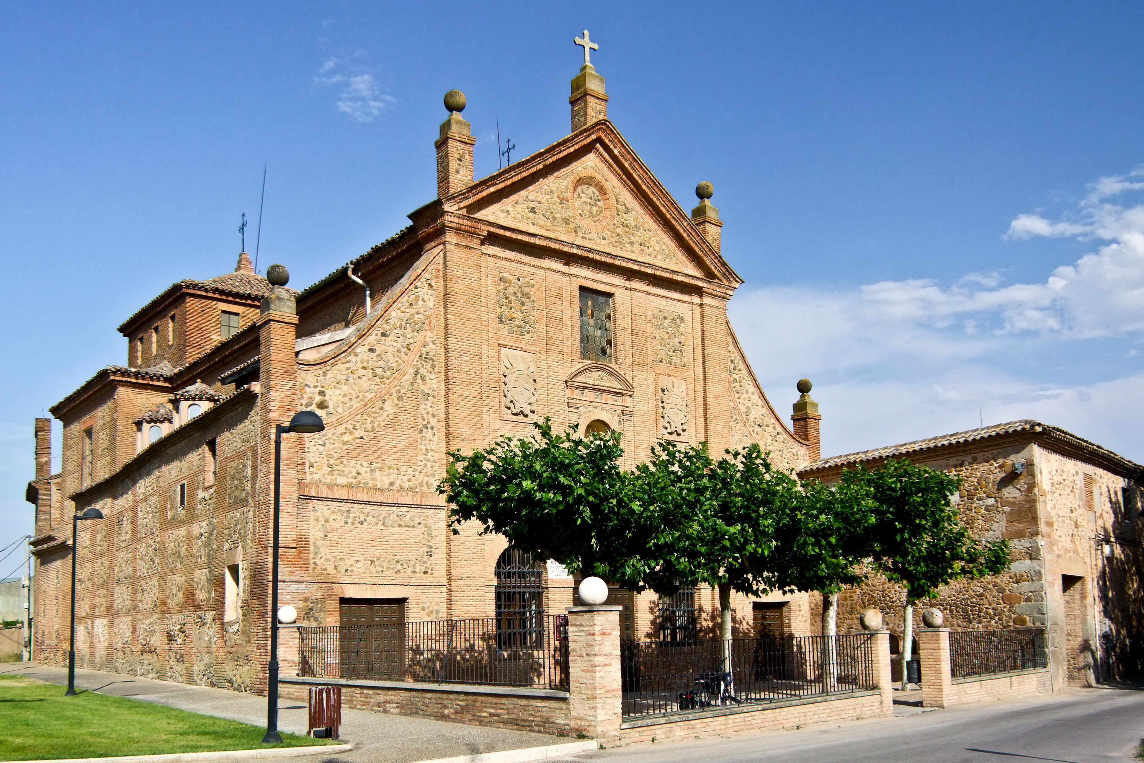 Santuario del Carmen en la localidad de Calahorra, La Rioja - España